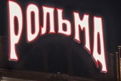 ТЦ был открыт в 2016 году